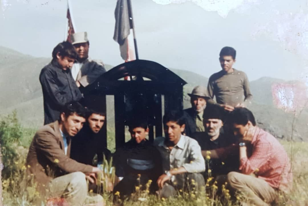 مزار شهید میربهروز ندایی - روستای خان کندی سال 1361